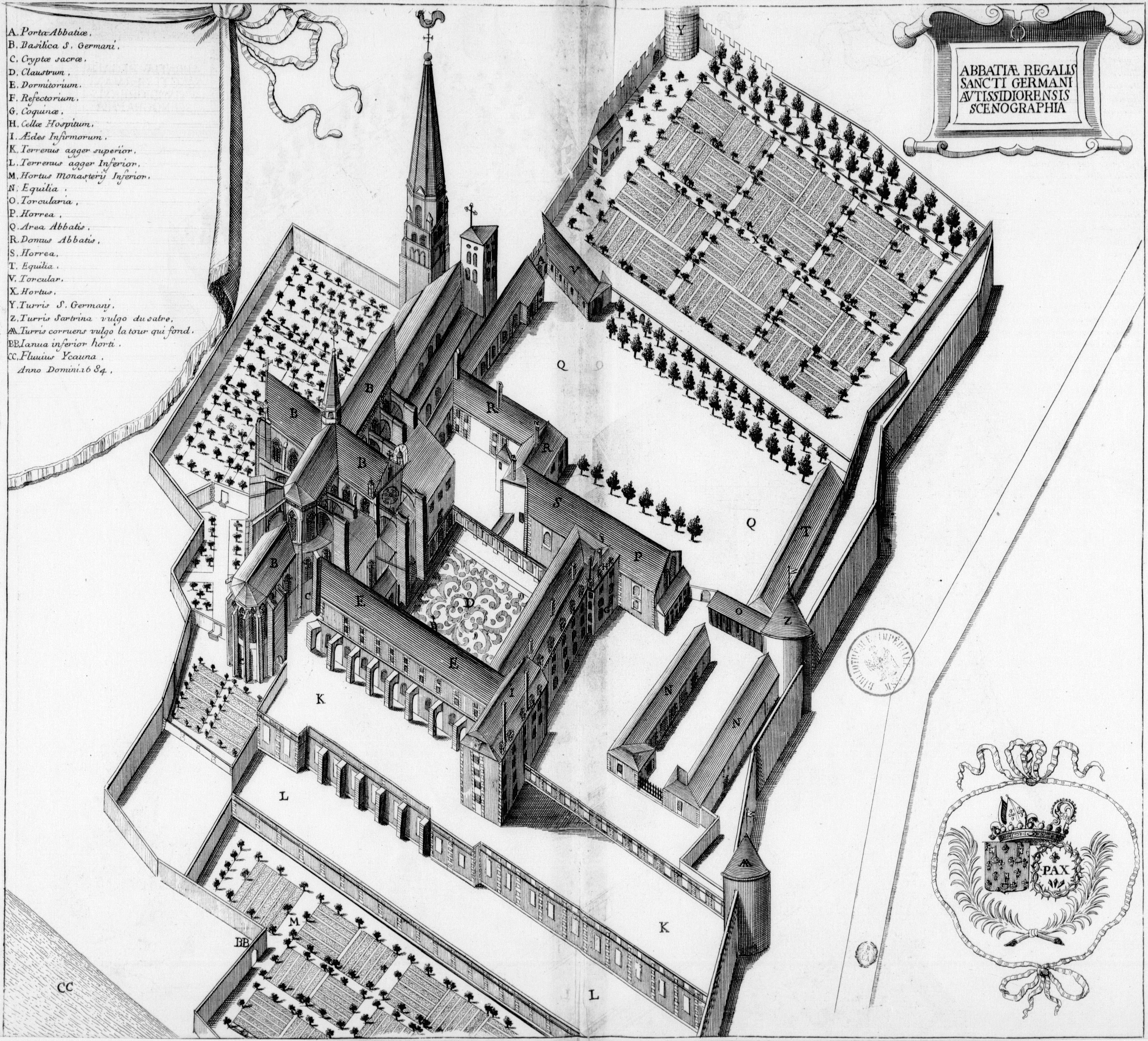 Planche gravée du 17ème siècle représentant l'abbaye Saint-Germain d'Auxerre, en France, dans le livre Monasticon Gallicanum.